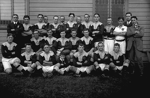 Équipe de Glebe, club de rugby à XIII, en 1911.